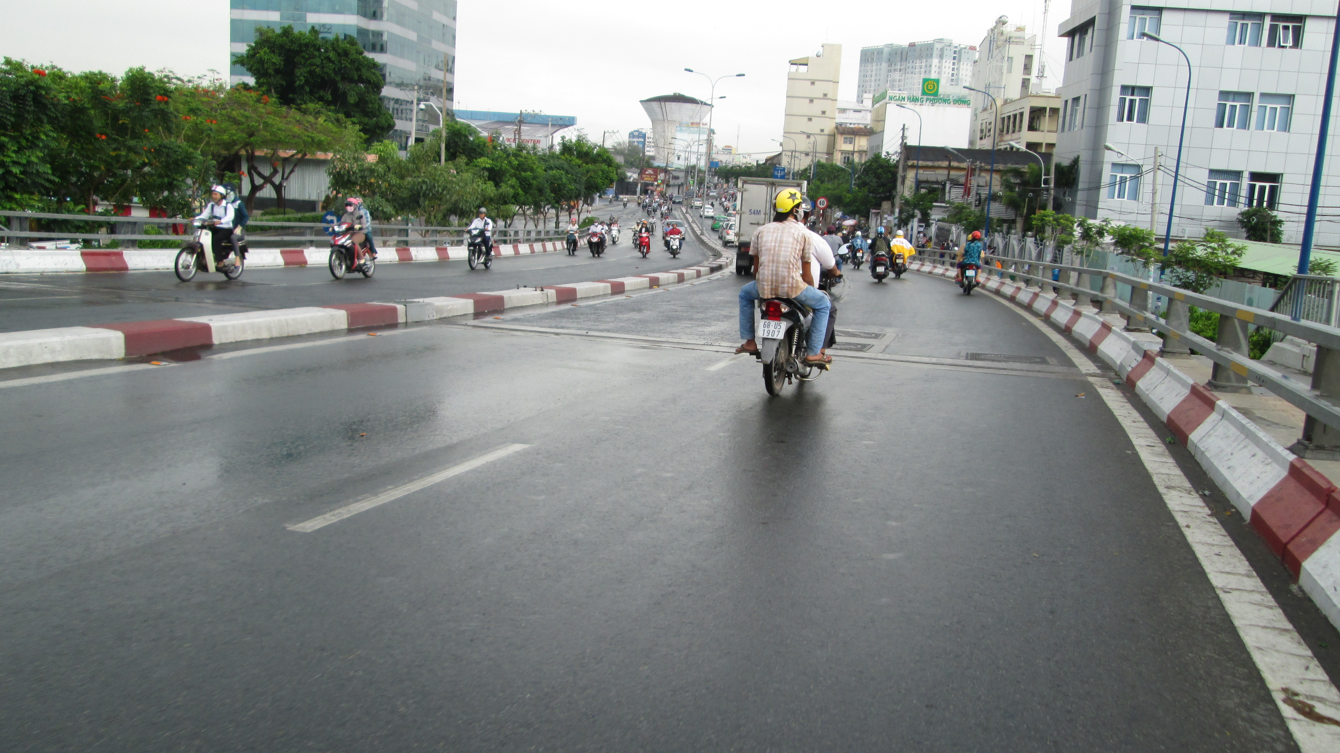 Hình chụp trên cầu Khánh Hội, tháng 4 năm 2013